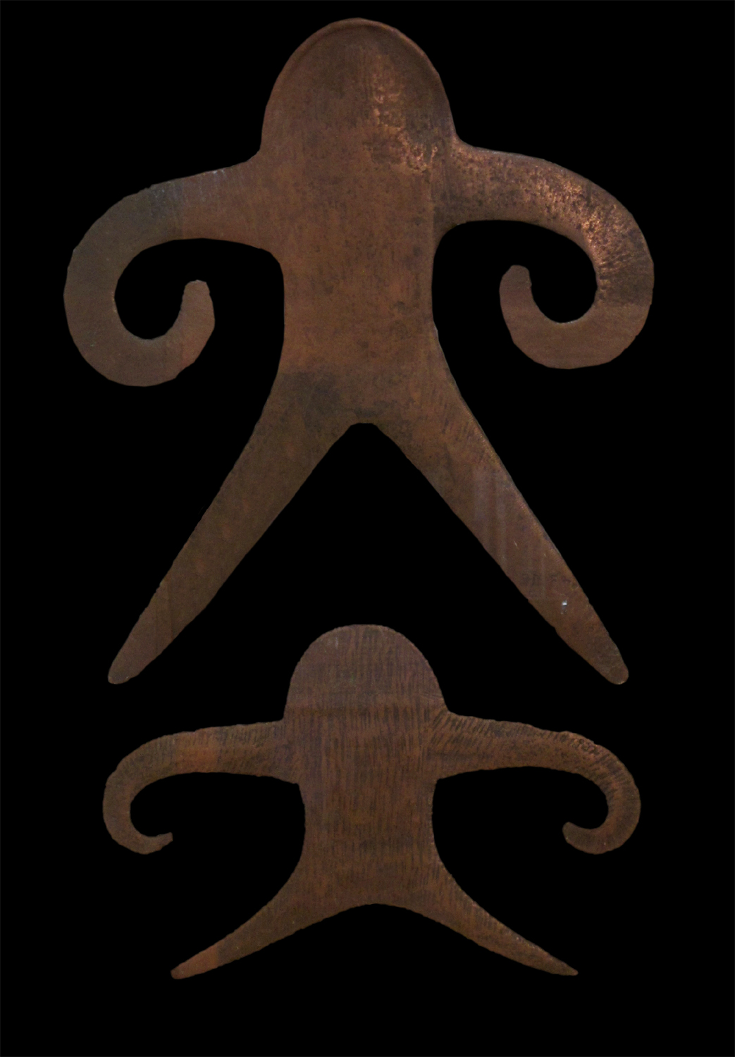 Figures anthropomorphes (?). Chalcolitique du bassin Gange-Yamuna. 2800 - 1500 avant notre ère. Provenance : Bisauli (212 km de New Delhi), district de Badaun, Uttar Pradesh. Bharat Kala Bhavan, Varanasi. Inv. n° 94620 et 94621